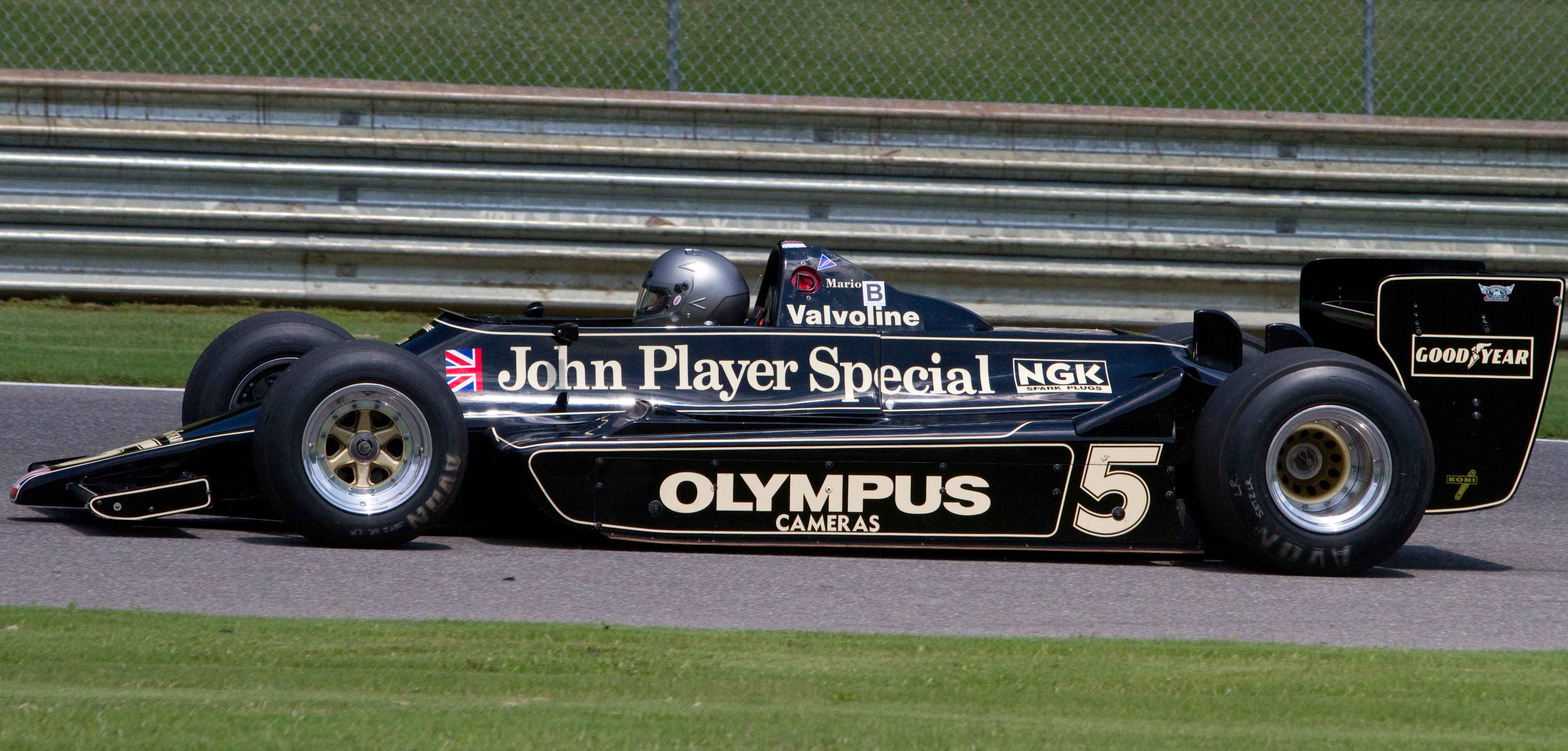 An ex-Mario Andretti Lotus 79 being driven at Barber Motorsports Park, 2010